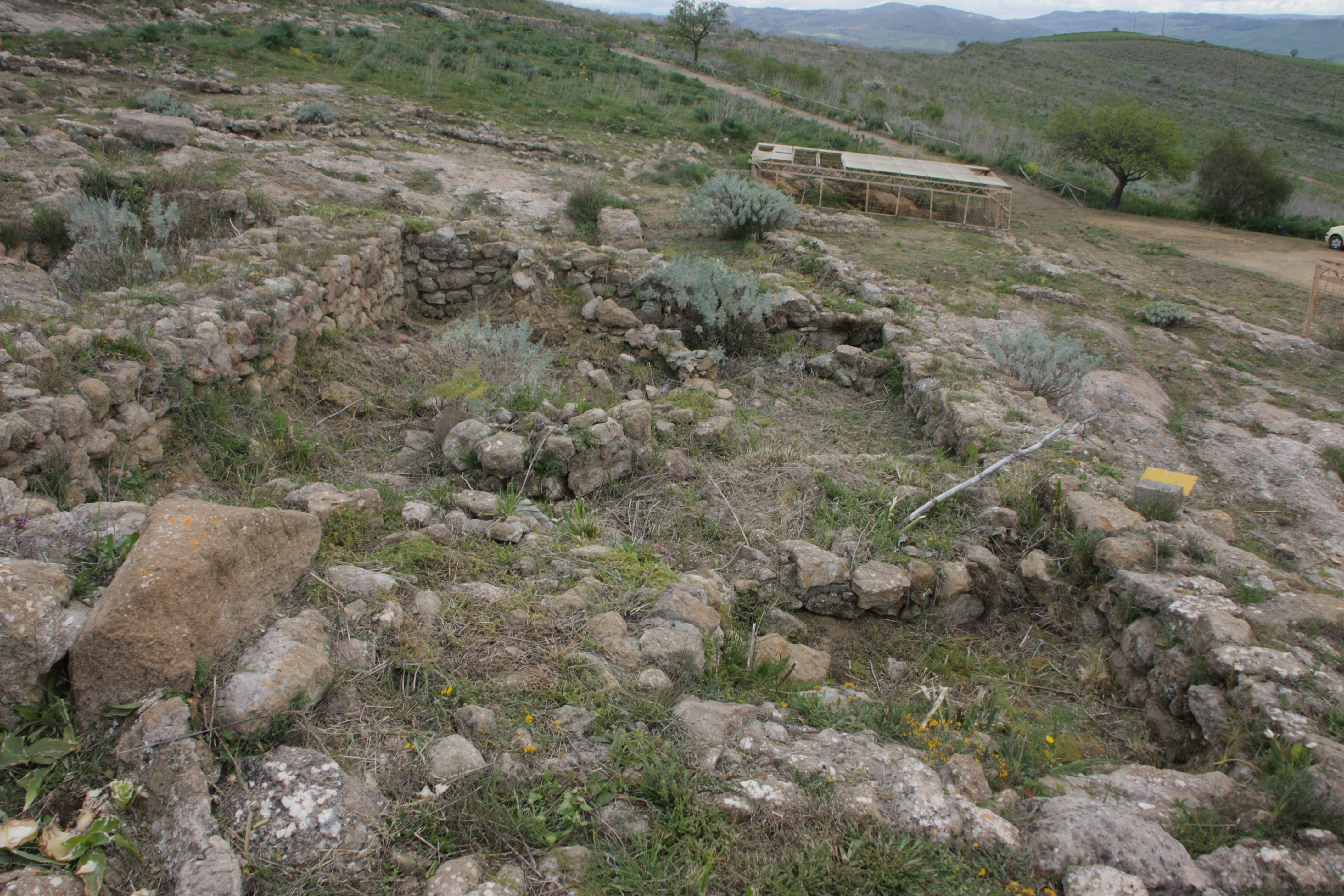 Sabucina